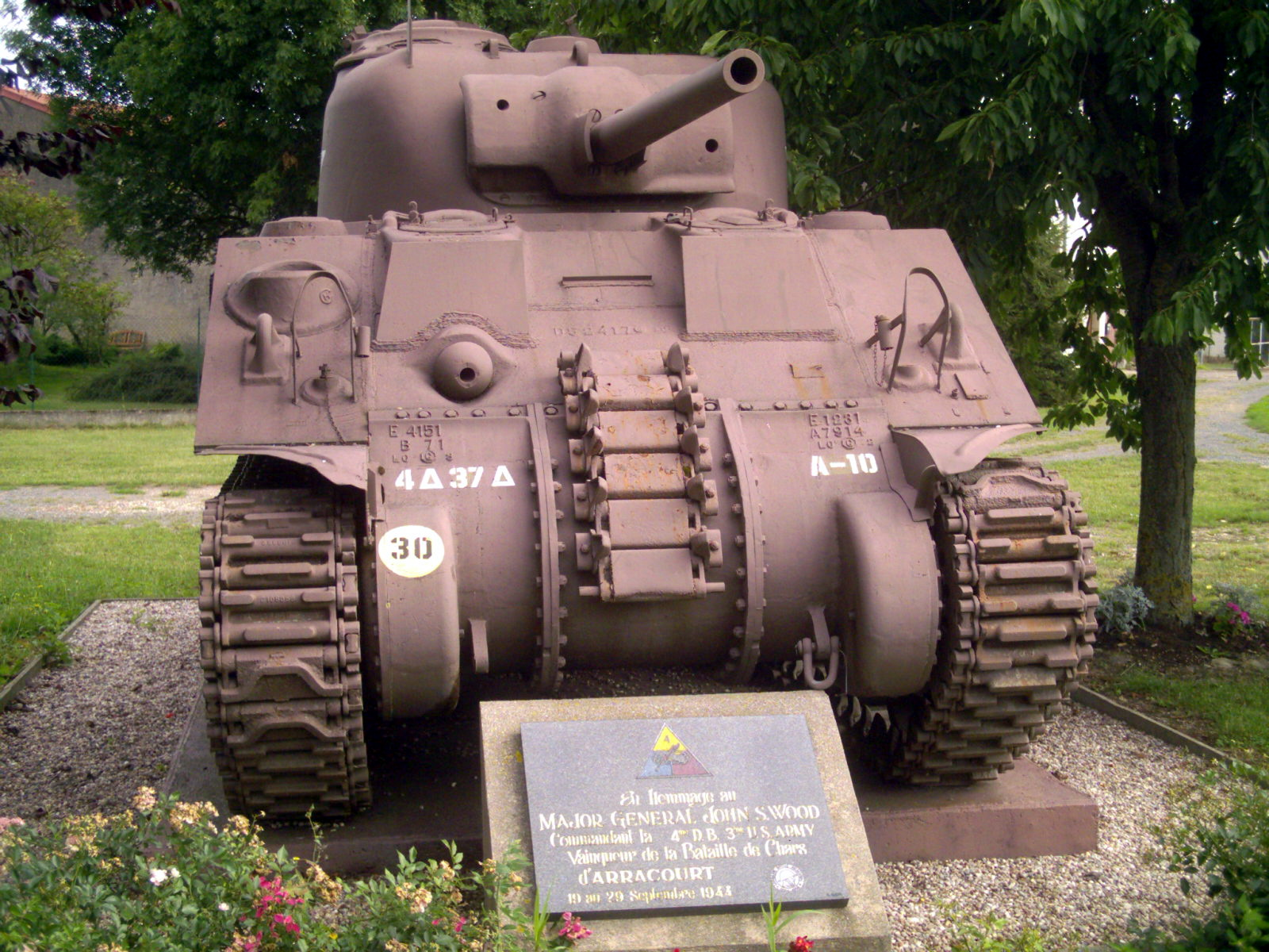 Arracourt: char M4 A4T Sherman commémorant la bataille de 1944